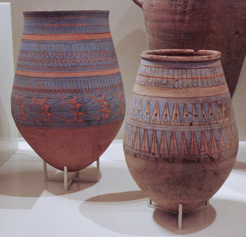 Links: Vorratsgefäss mit eingebrannter blauer floraler Bemalung, Altes Ägypten, Neues Reich, 18. Dynastie, um 1340 v. Chr. Amarna, Keramik, ÄM 22597 - Rechts: Kleines Vorratsgefäss mit blauem geometrischem Dekor, Neues Reich, 18. Dynastie, 1540-1075 v. Chr., Luxor, Keramik, ÄM 14988